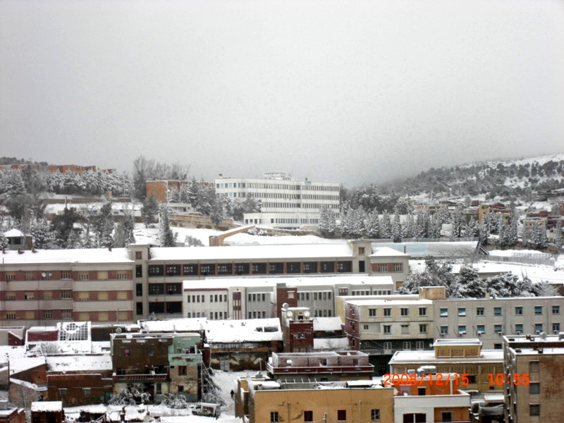 photo de tiaret prise en 2008